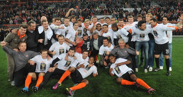 Шахтар чемпіон України 2010/2011